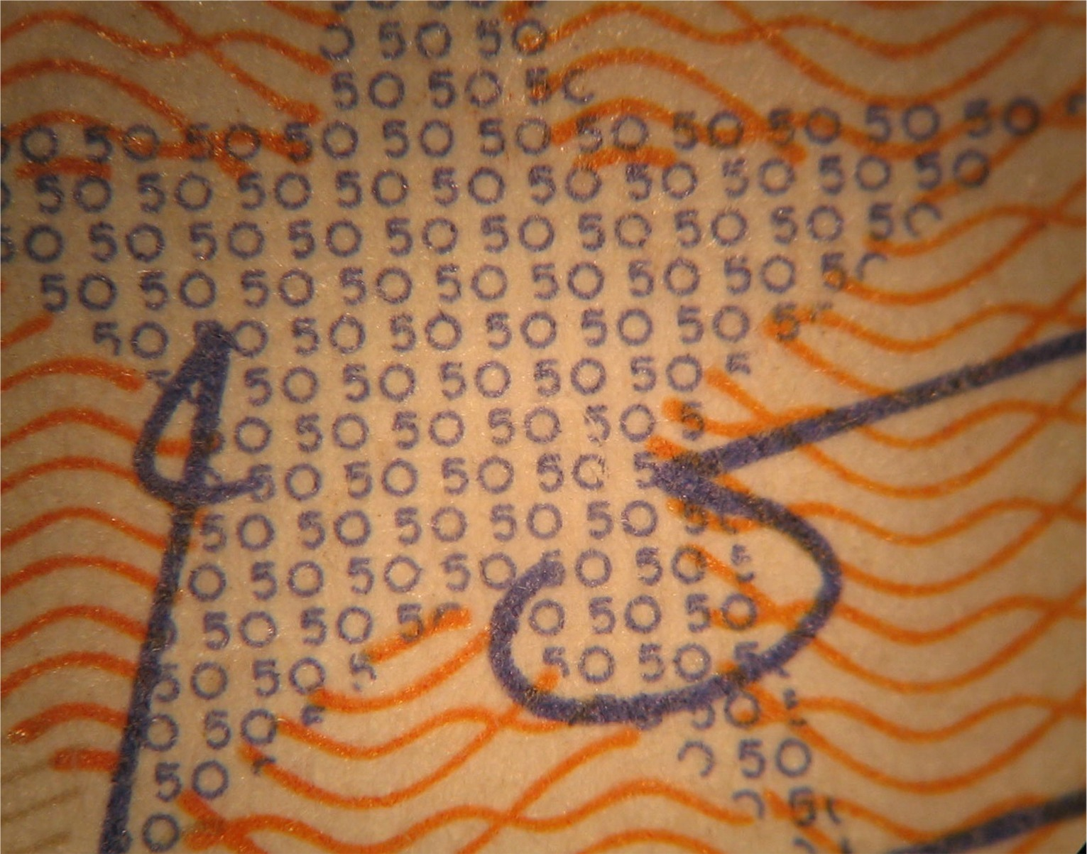 Der Druck eines 50-Euro Scheines unter dem Mikroskop (unterschrft EZB-Präs.)